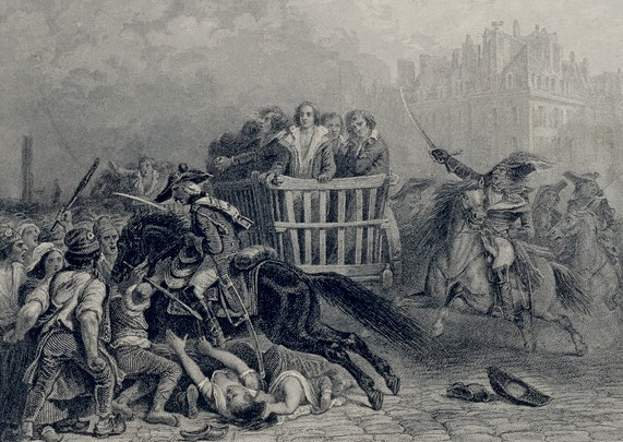 La dernière charrette vers la guillotine (avant Thermidor ?)